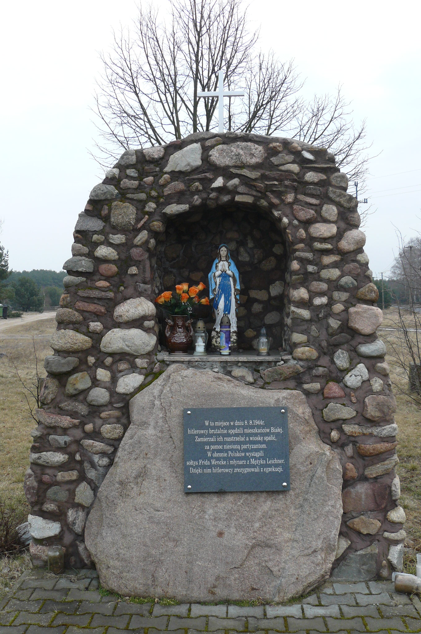 Biała w gm. Wieleń. Kaplica Wdzięczności.